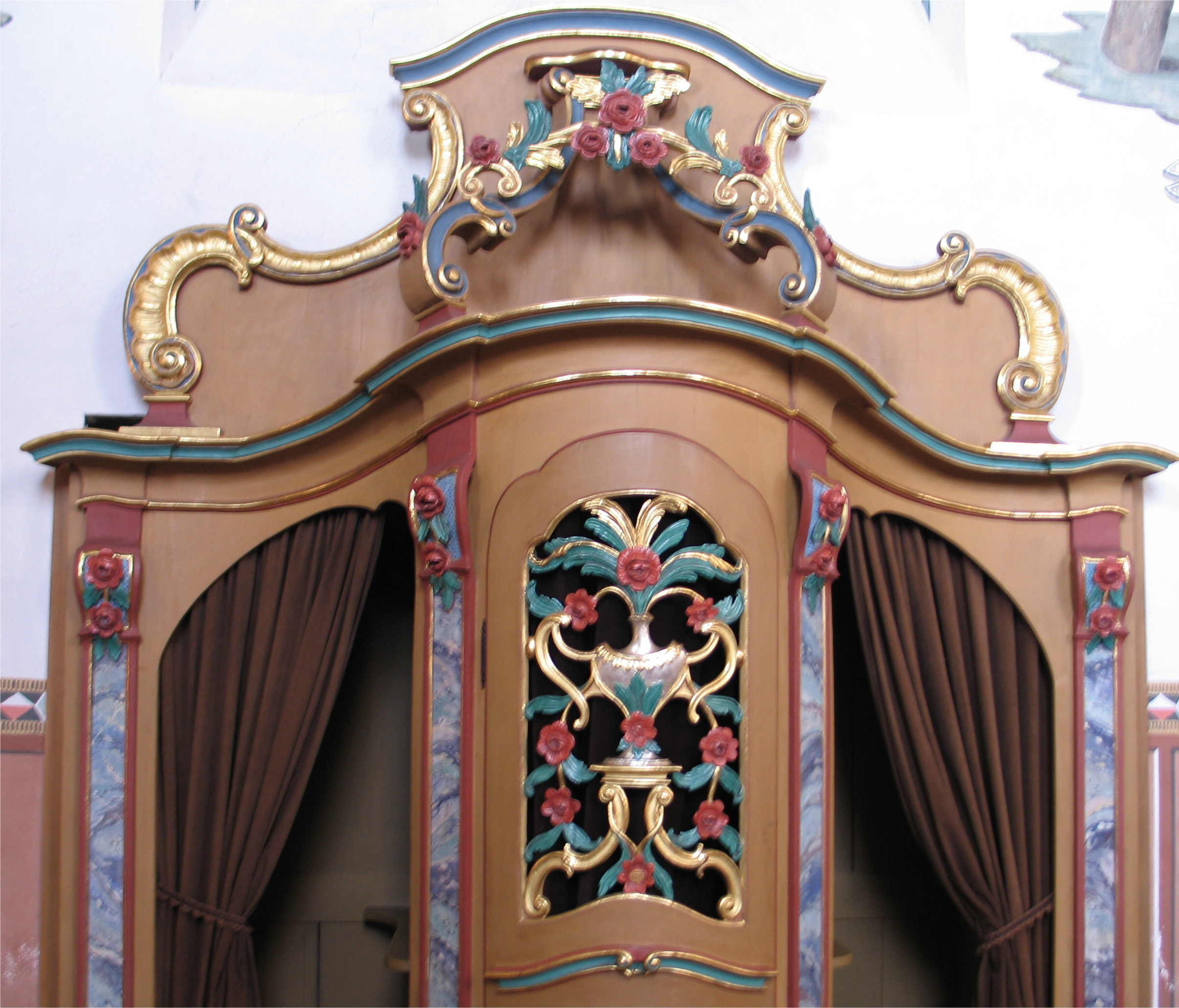 Beichtstull an der Kierch vu Butzweiler (Däitschland)